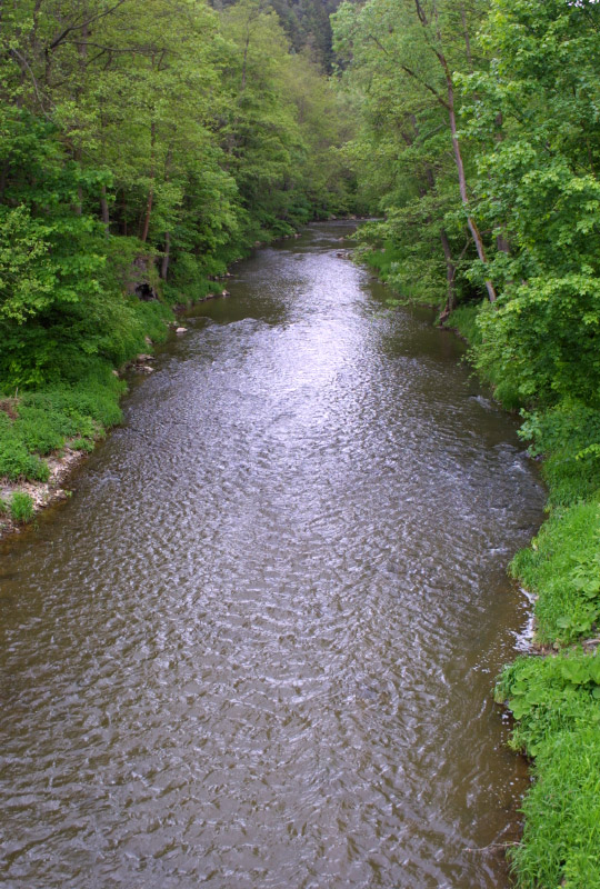 Koryto řeky Střely pod Píplovým Mlýnem, z mostu silnice II/231